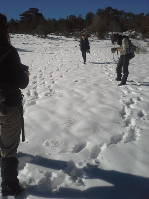 Estudio de marcas de alas de buitre en nieve (P.N. Cazorla, Segura y Las Villas)